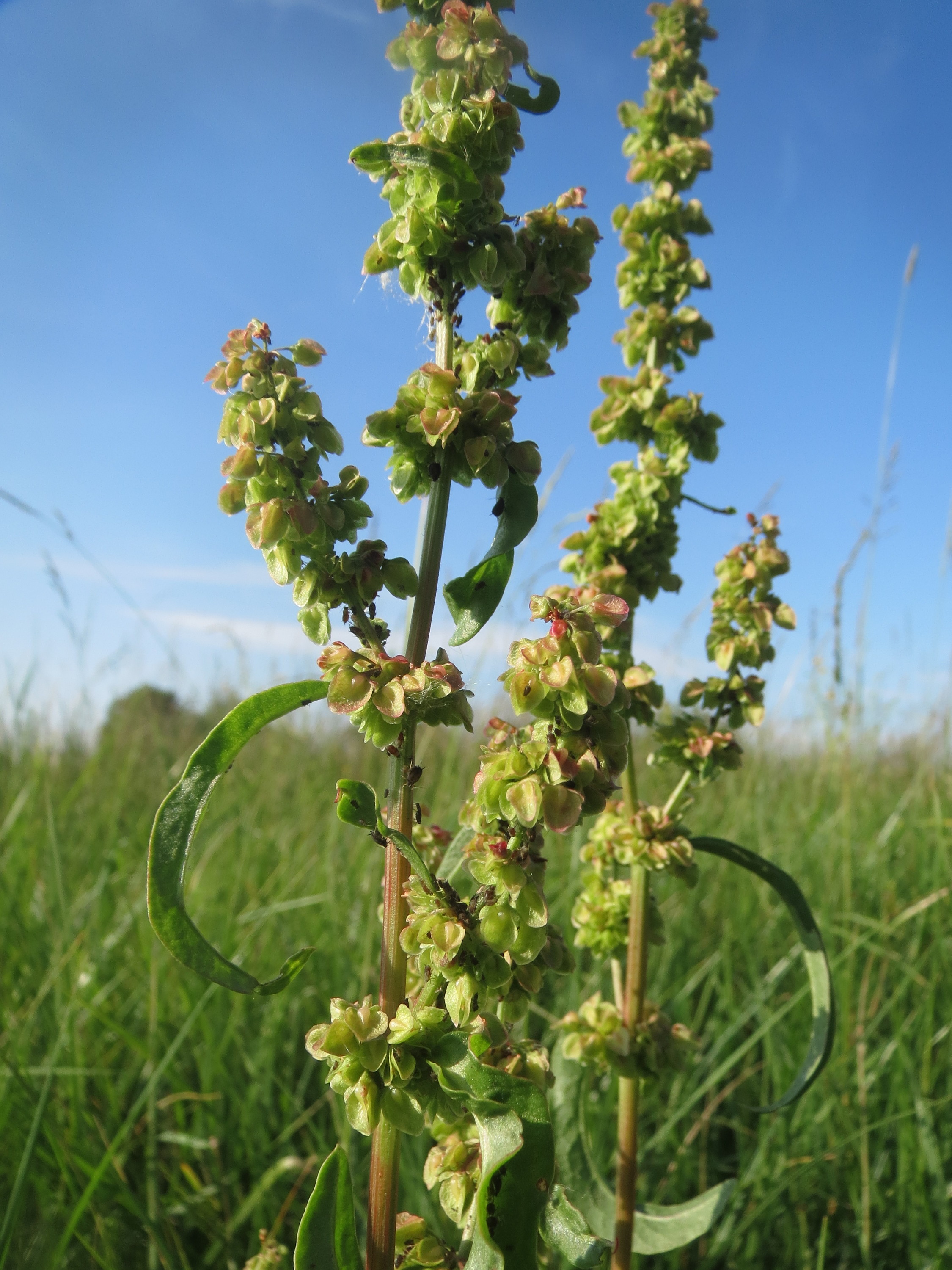 Krauser Ampfer (Rumex crispus) im Landschaftsschutzgebiet „Hockenheimer Rheinbogen“